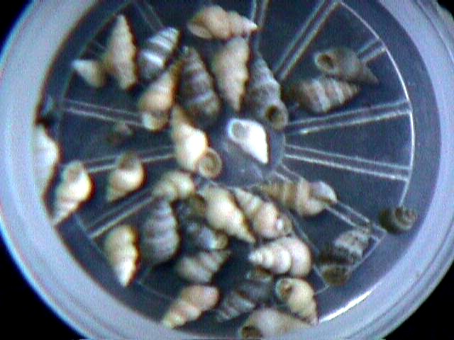 Pyrgophorus coronatus molusco gastropodo Hydrobiidae del Lago de Valencia, estado Carabobo - Venezuela